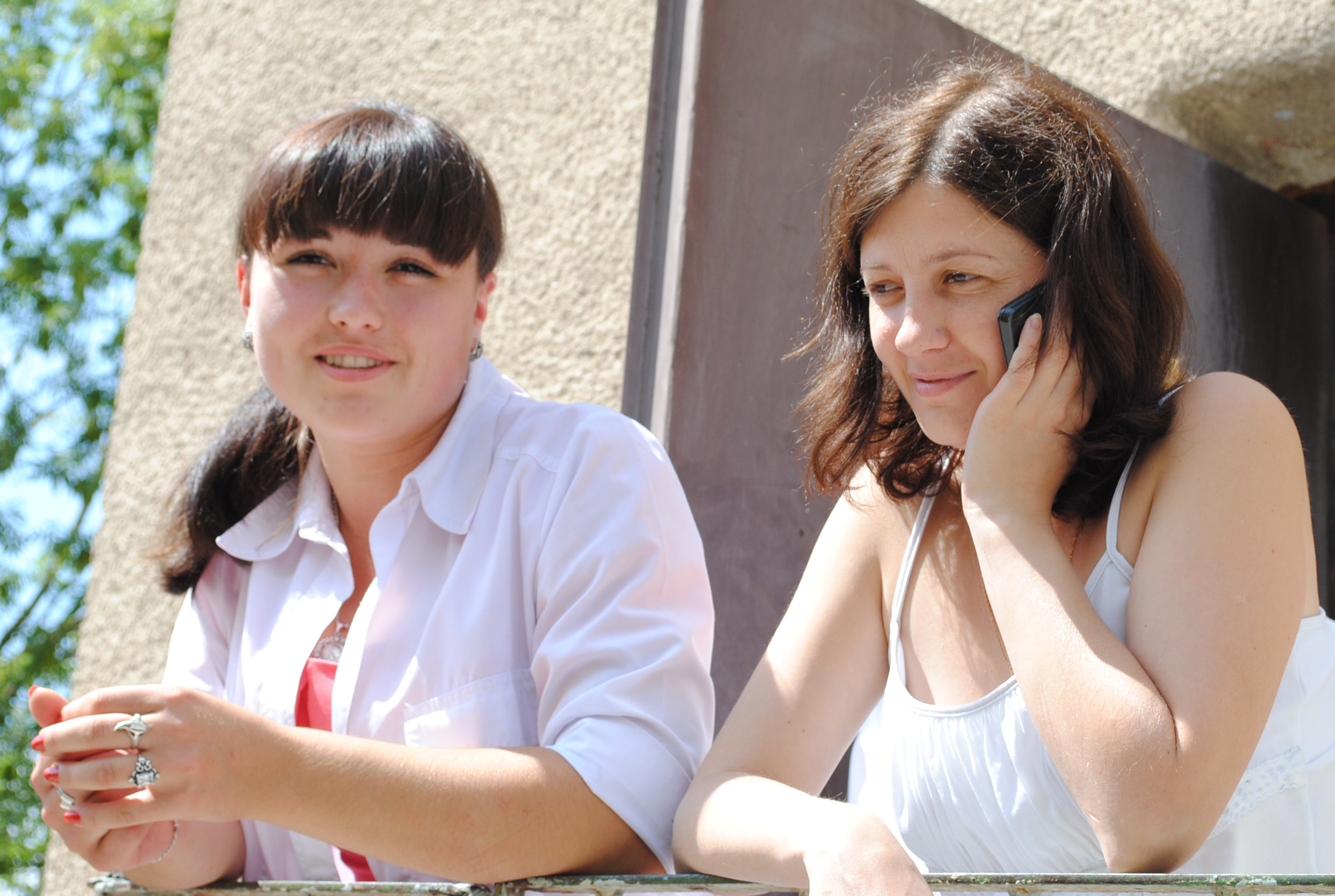 Медсестри приймального відділення Бережанської центральної районної клінічної лікарні Мар'яна Горська та Ірина Боднарчук.